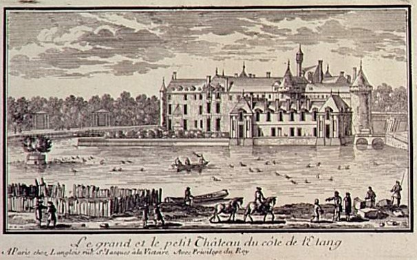 Le grand et le petit château de Chantilly au XVIIe siècle. Gravure d'Adam Pérelle.